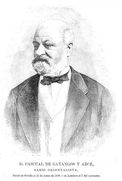 Pascual de Gayangos y Arce, sabio orientalista, 21 de junio de 1809 y falleció en Londres el 5 del corriente.